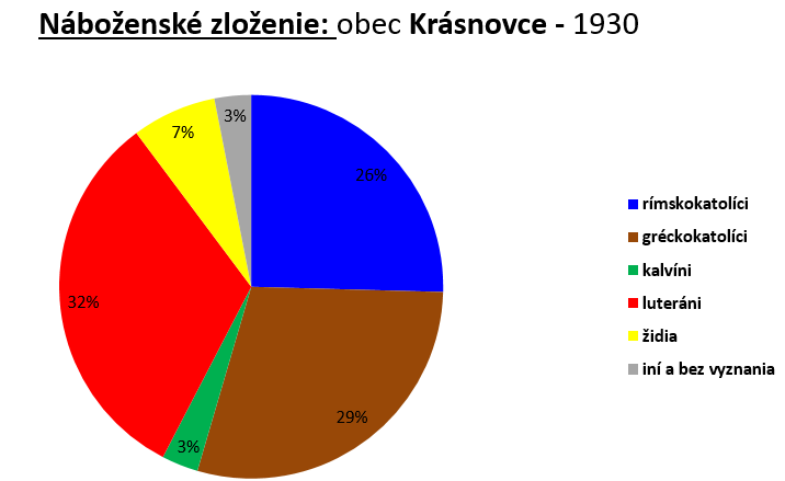 Náboženské zloženie obce Krásnovce, podľa sčítania v roku 1930.